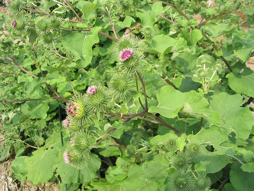 Arctium lappa (grande bardane). Photo prise à Sint-Amands en août 2004 Jean Tosti 2005